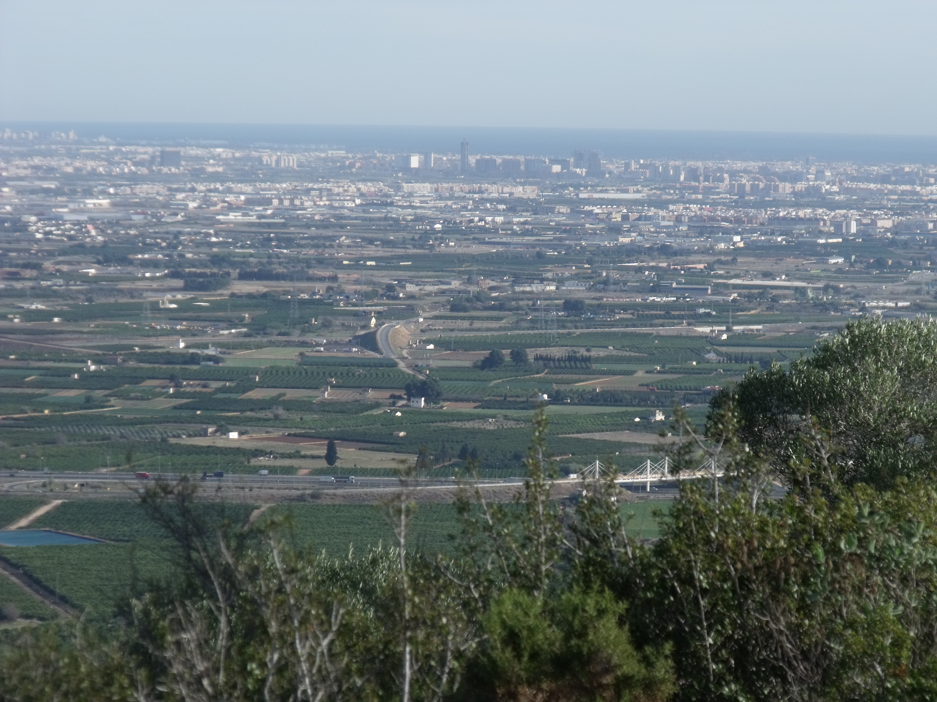 Valencia vista desde la Sierra Perenxisa.